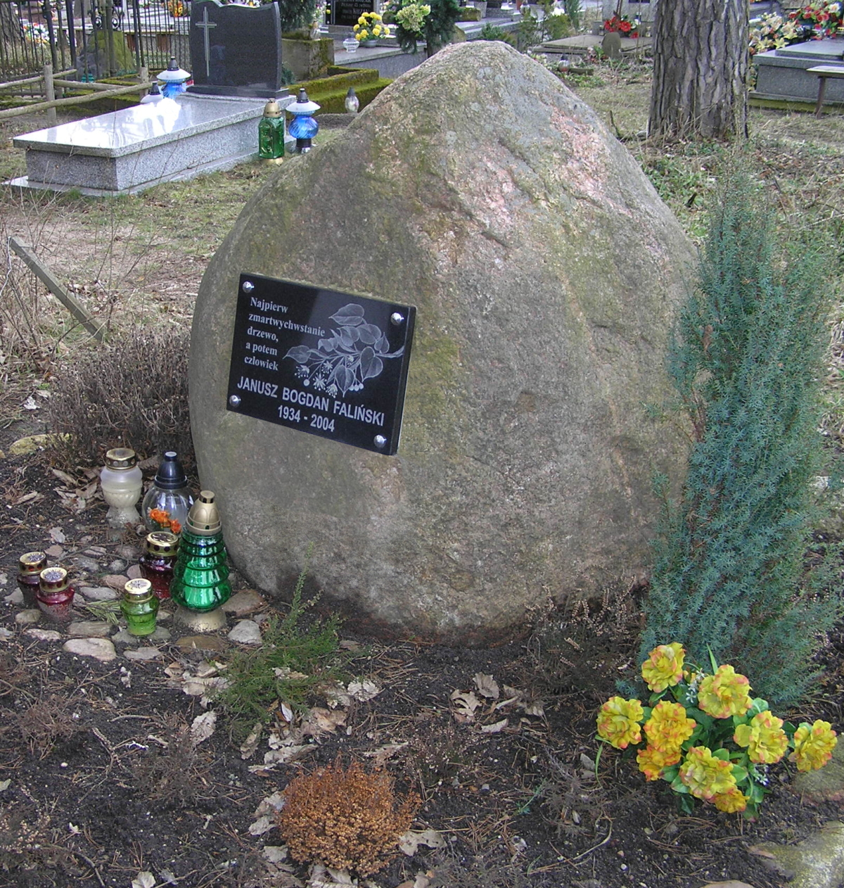 Graves Janusz Bogdan Faliński, Białowieża, Polska